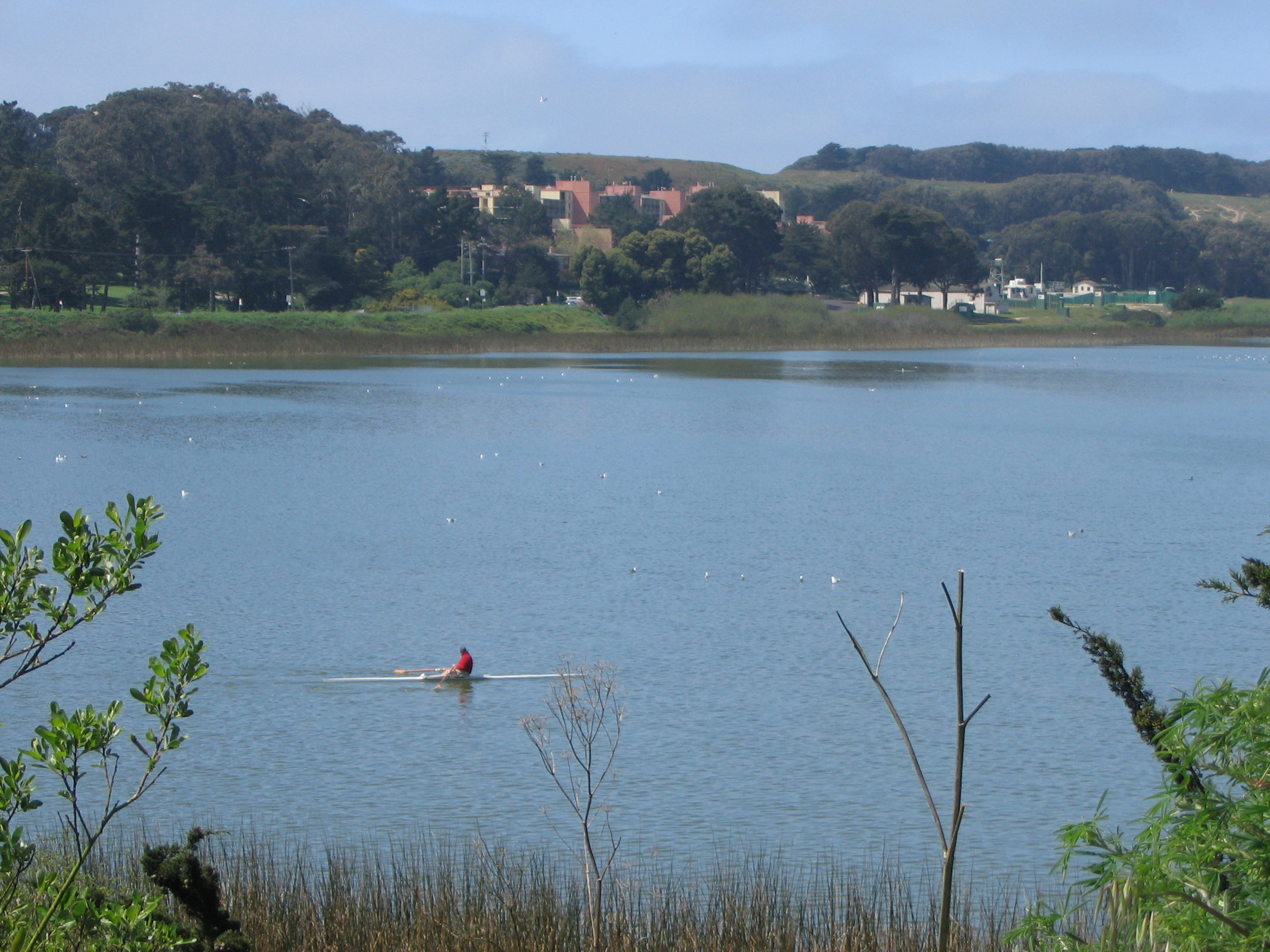 Westlake at SFSU